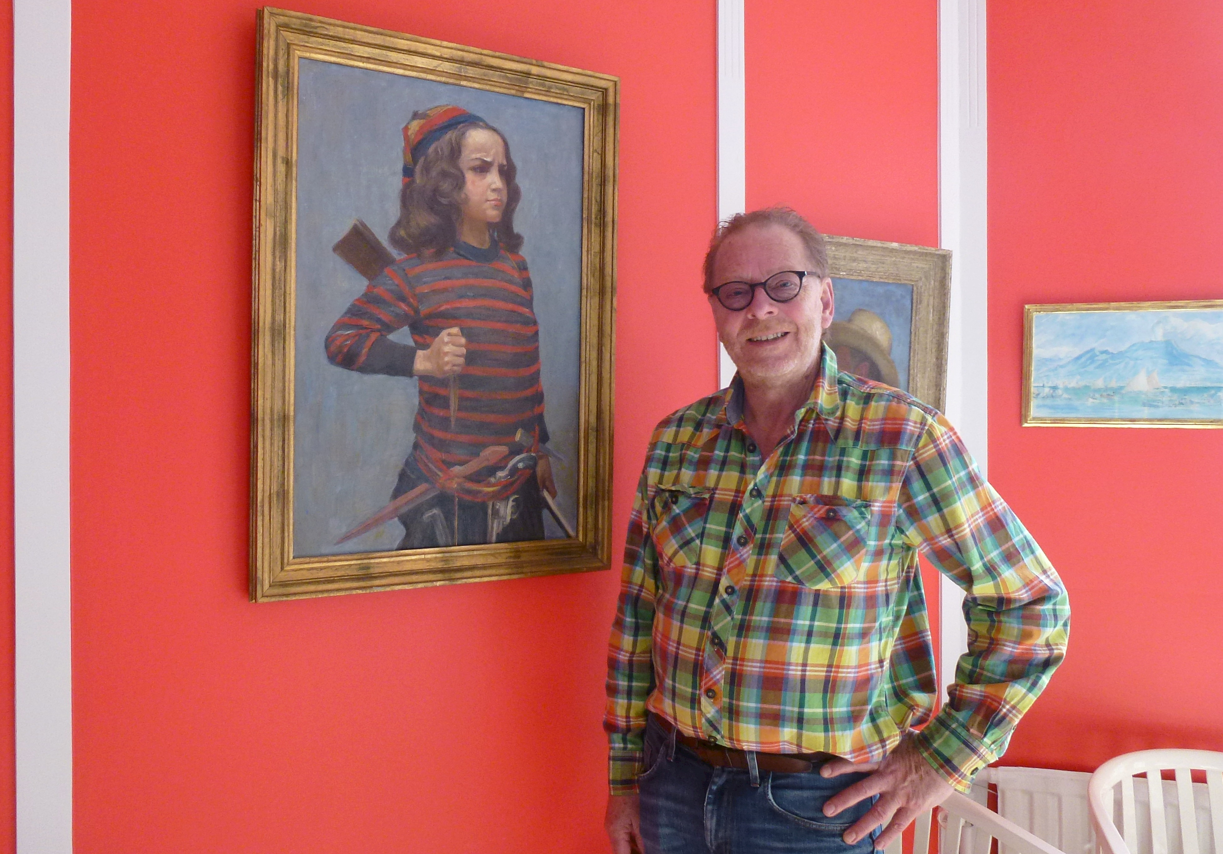 Fausto Acke och ägaren Claes Moser